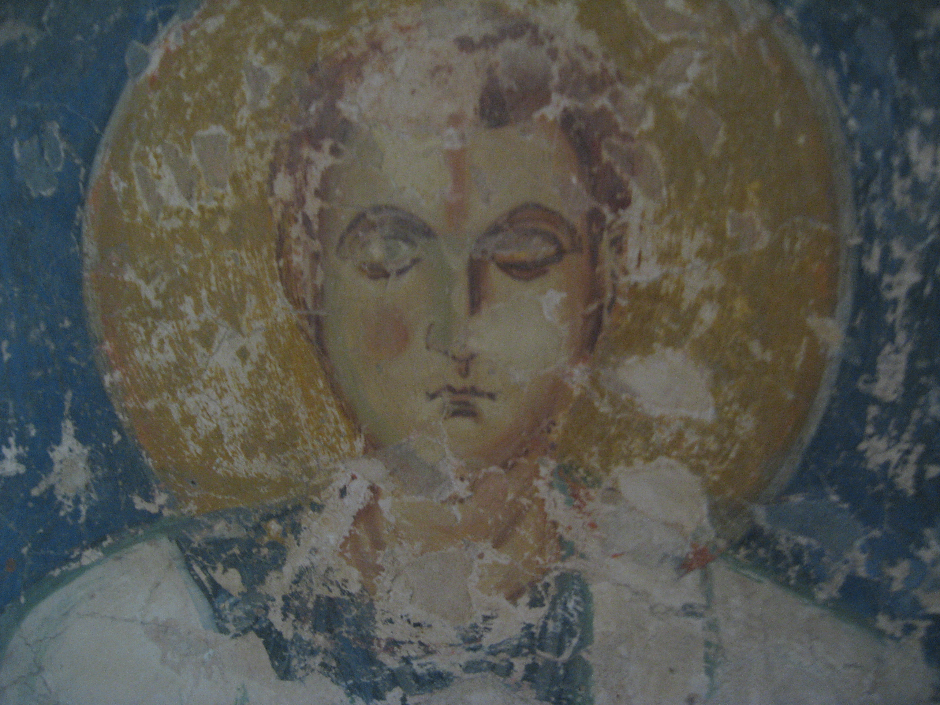 Диакон. Фреска собора Антониева монастыря. 1125 год.